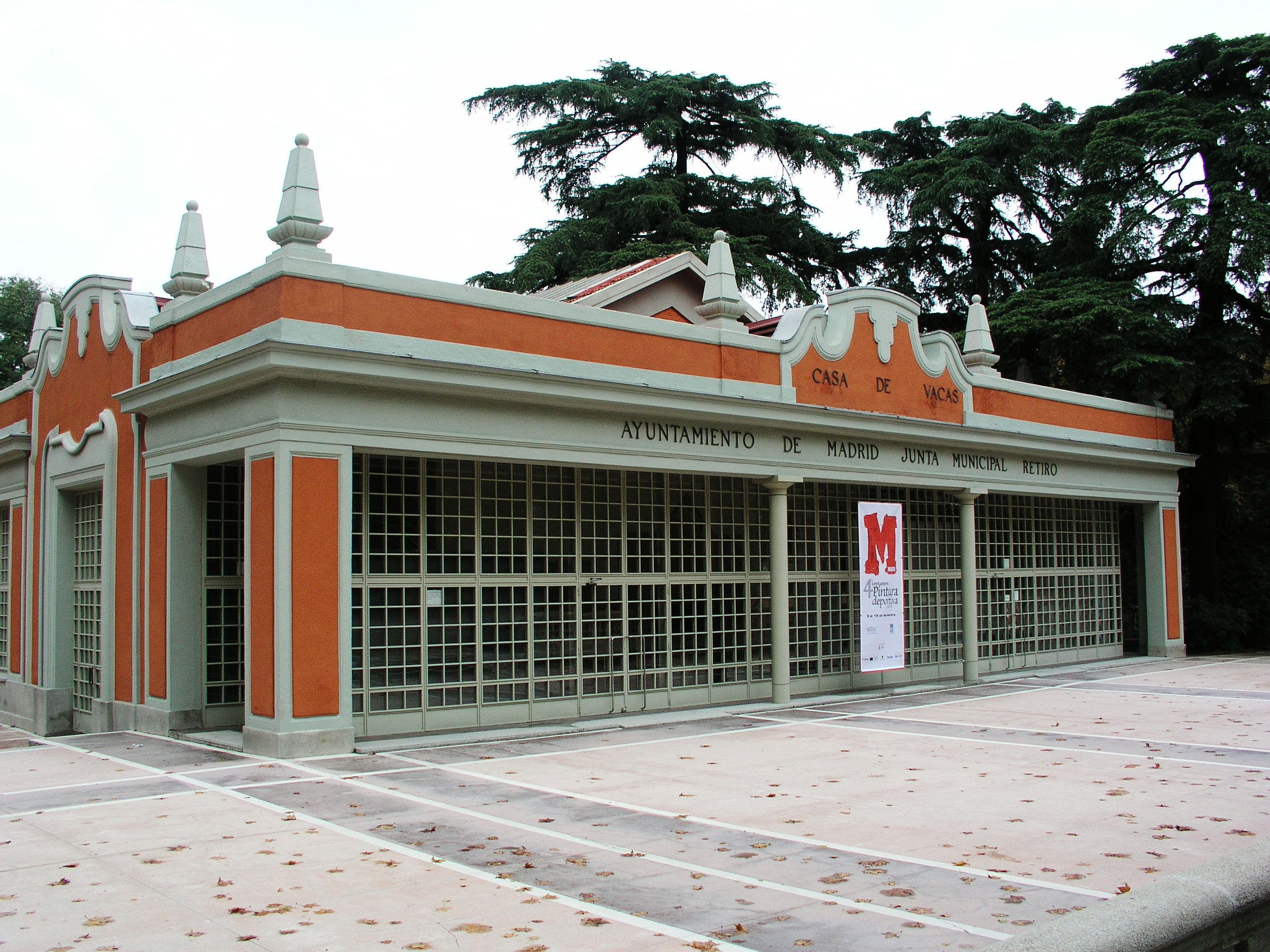 Jardines del Buen Retiro, Madrid, Spain. Casa de Vacas.